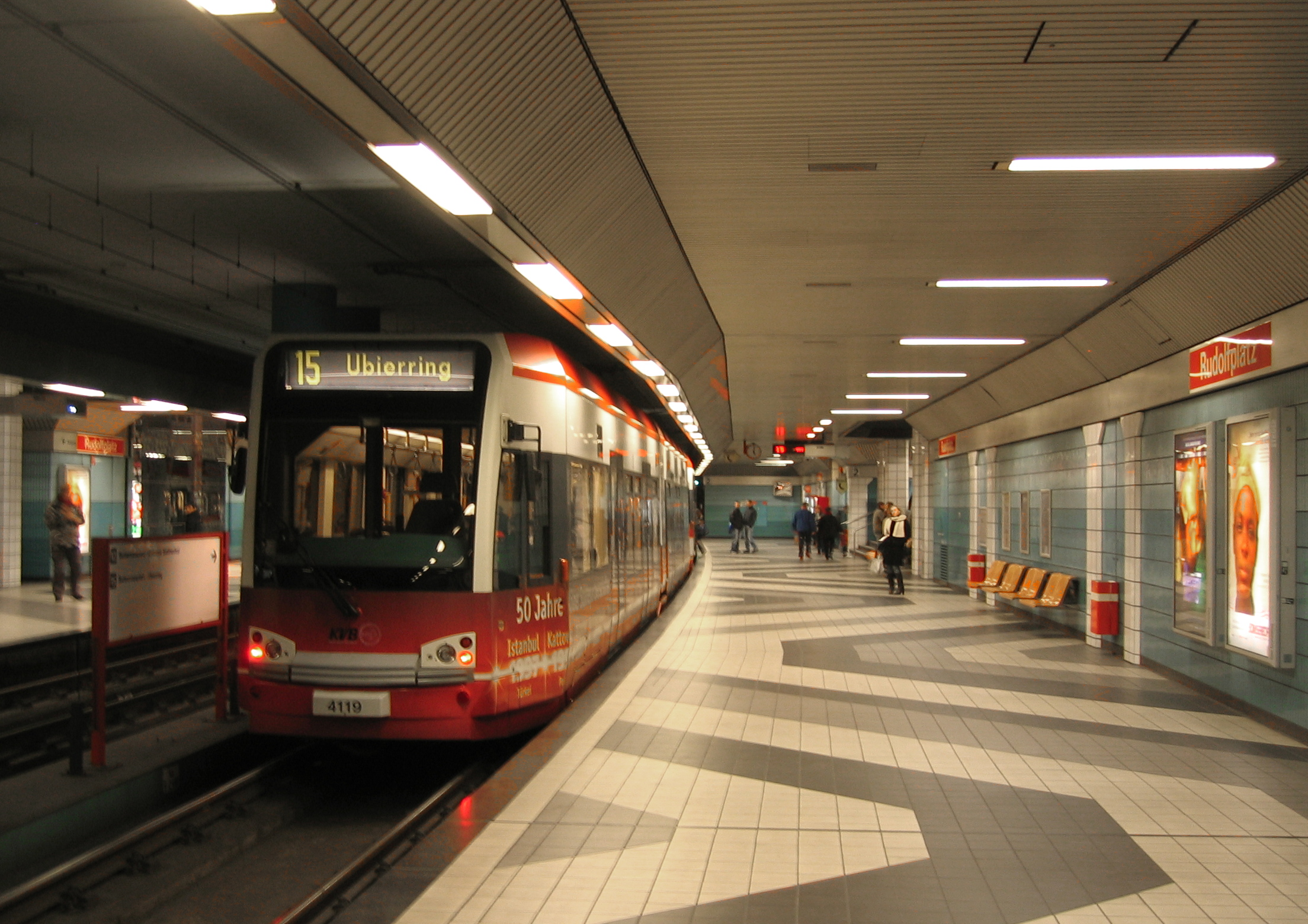 U-Bahn-Station Rudolfplatz der Stadtbahn Köln